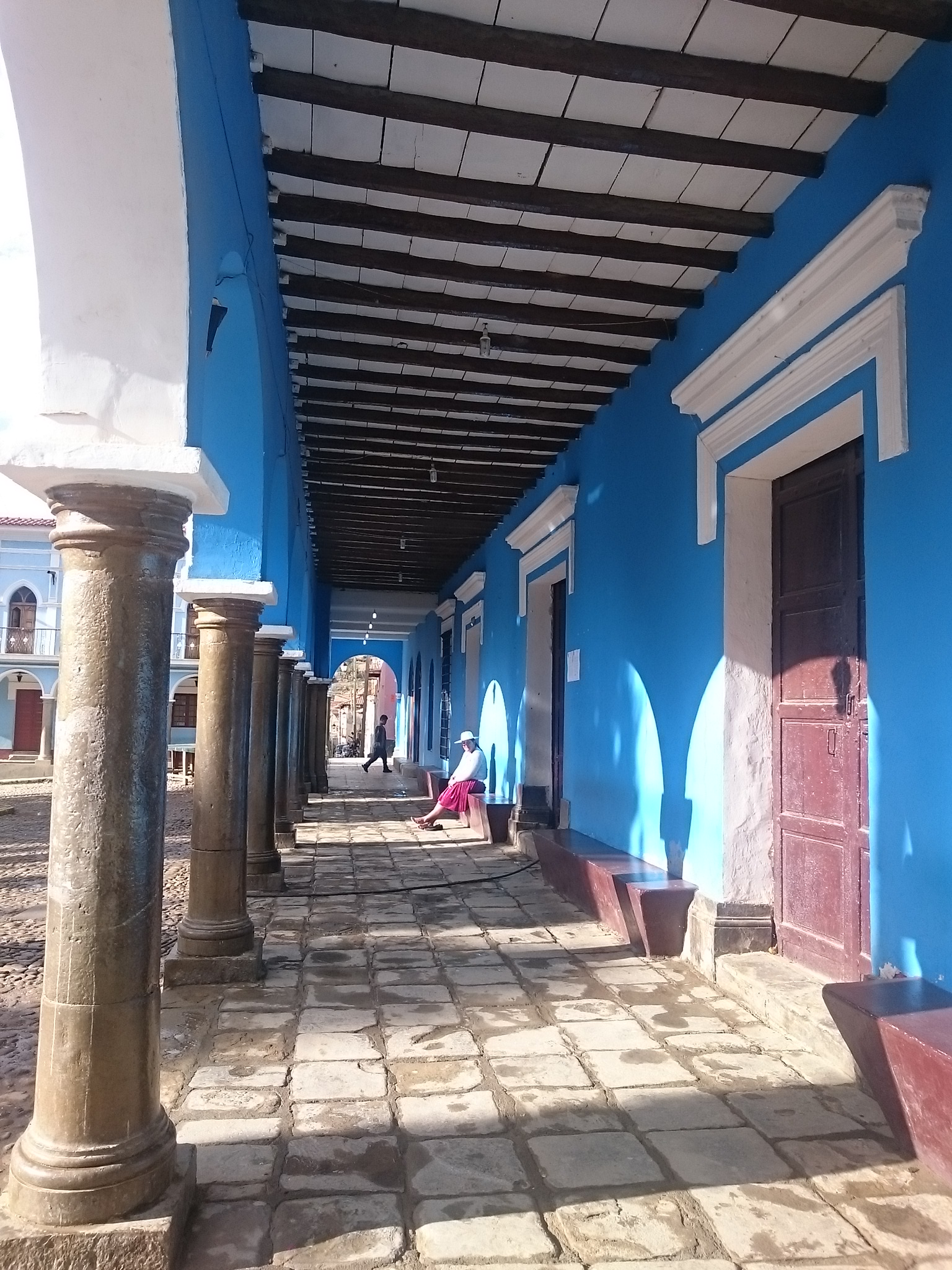 Templo de Totora, plaza principal This medium shows the protected monument with the number C/00-386 in Bolivia.